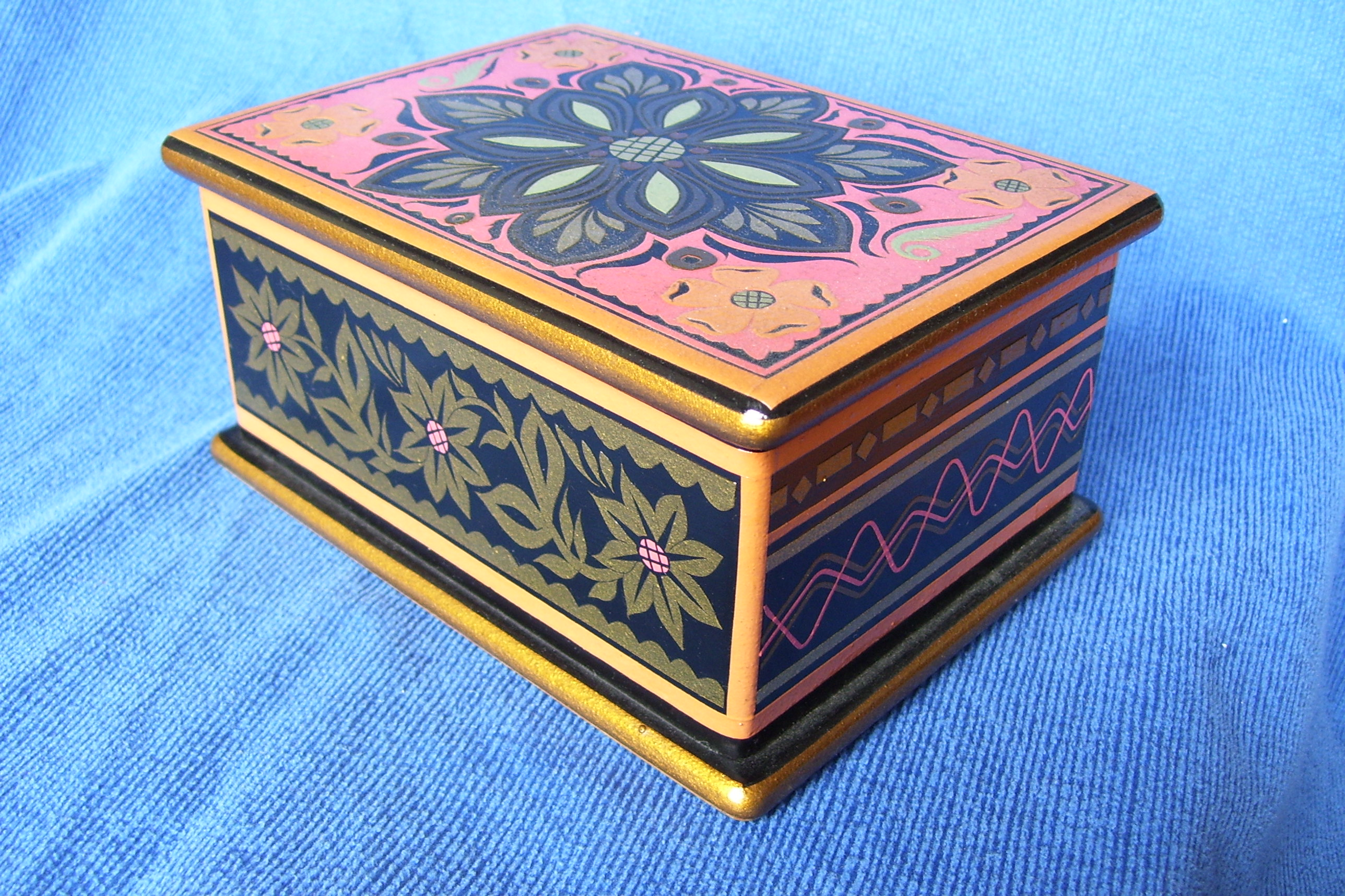 Cofre decorado con barniz de Pasto, artesanía de San Juan de Pasto, Colombia